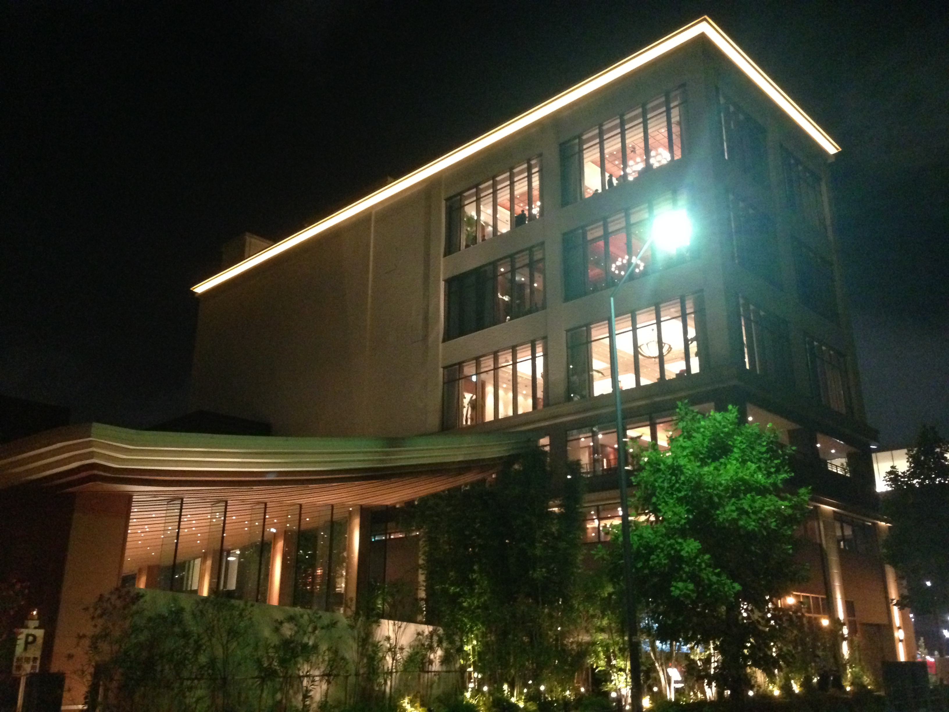 横浜市みなとみらい地区にある結婚式場「グランドオリエンタルみなとみらい」の北側外観。左側は挙式会場のサウンドホール（音楽堂）、右側はバンケット（披露宴会場）やパーティースペース、ゲストラウンジ、レストラン、アートギャラリーなどが入る高層棟。